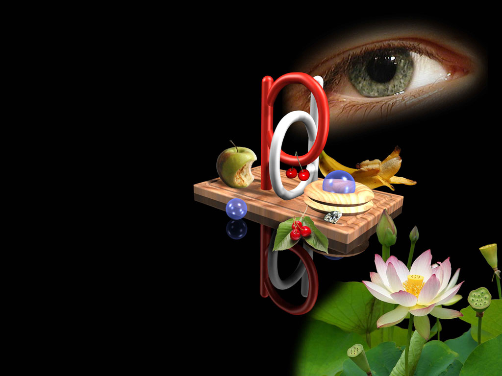 Grundlage war neben eigenen Fotos die Lotusblüte (PD) von [1] sowie 3D-Bilder aus AutoCAD